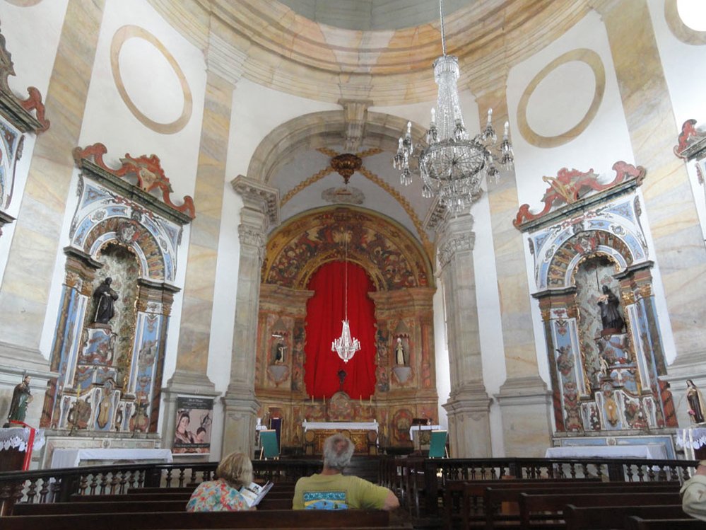 Igreja de Nossa Senhora do Rosário dos Homens Pretos em Ouro Preto